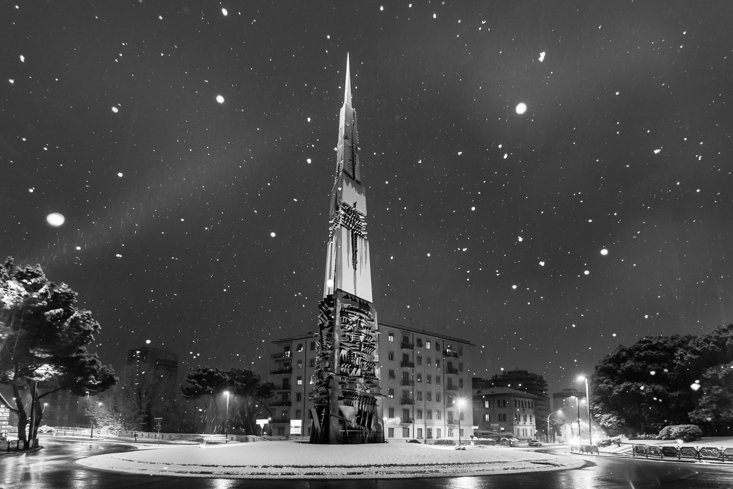 Terni, "Lancia di Luce" di Arnaldo Pomodoro This is a photo of a monument which is part of cultural heritage of Italy.